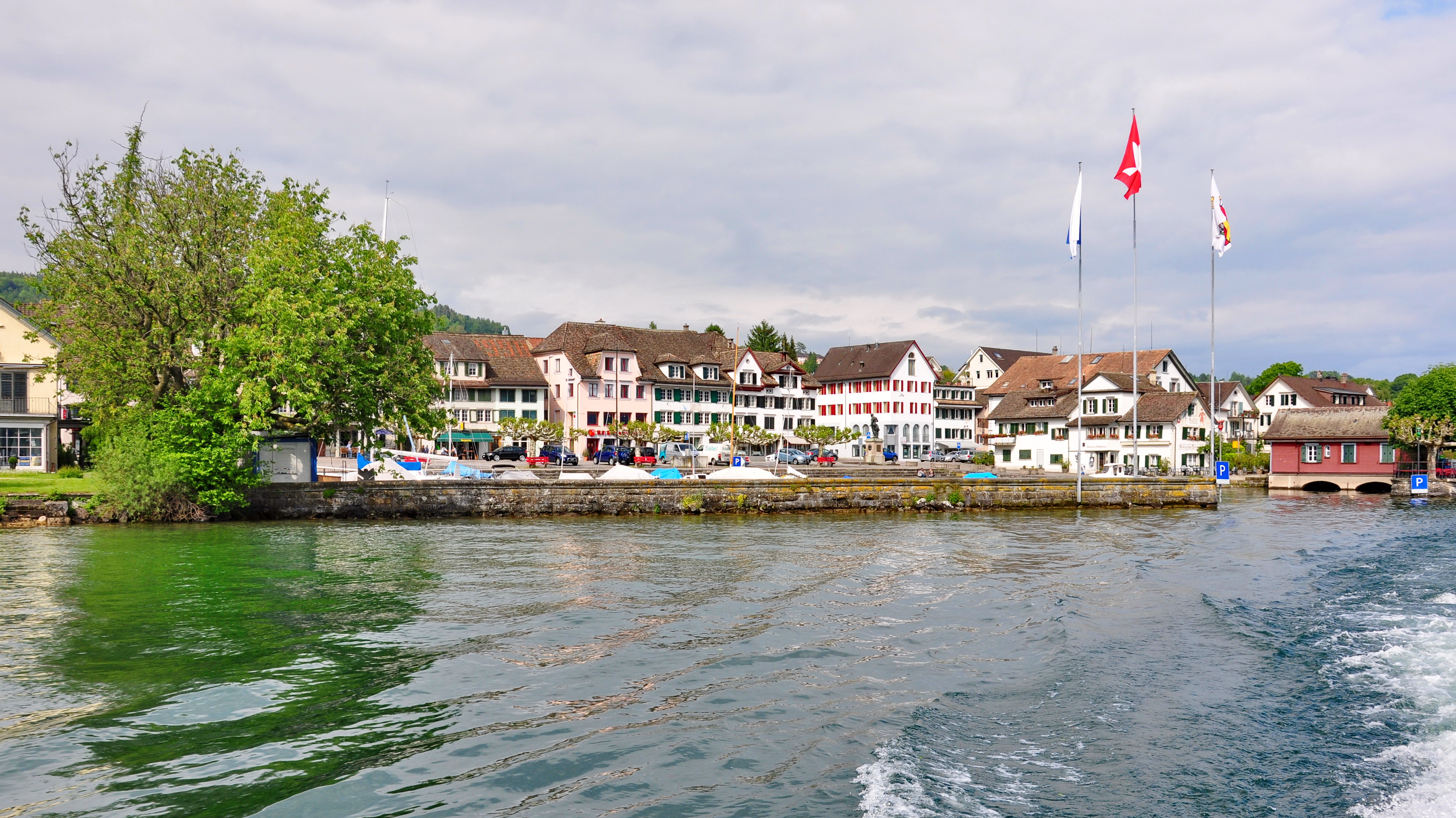 Stäfa and Pfannenstiel (Switzerland), as seen from Lake Zürich